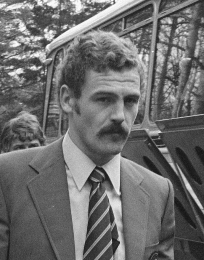 Hans Posthumus in 1972.